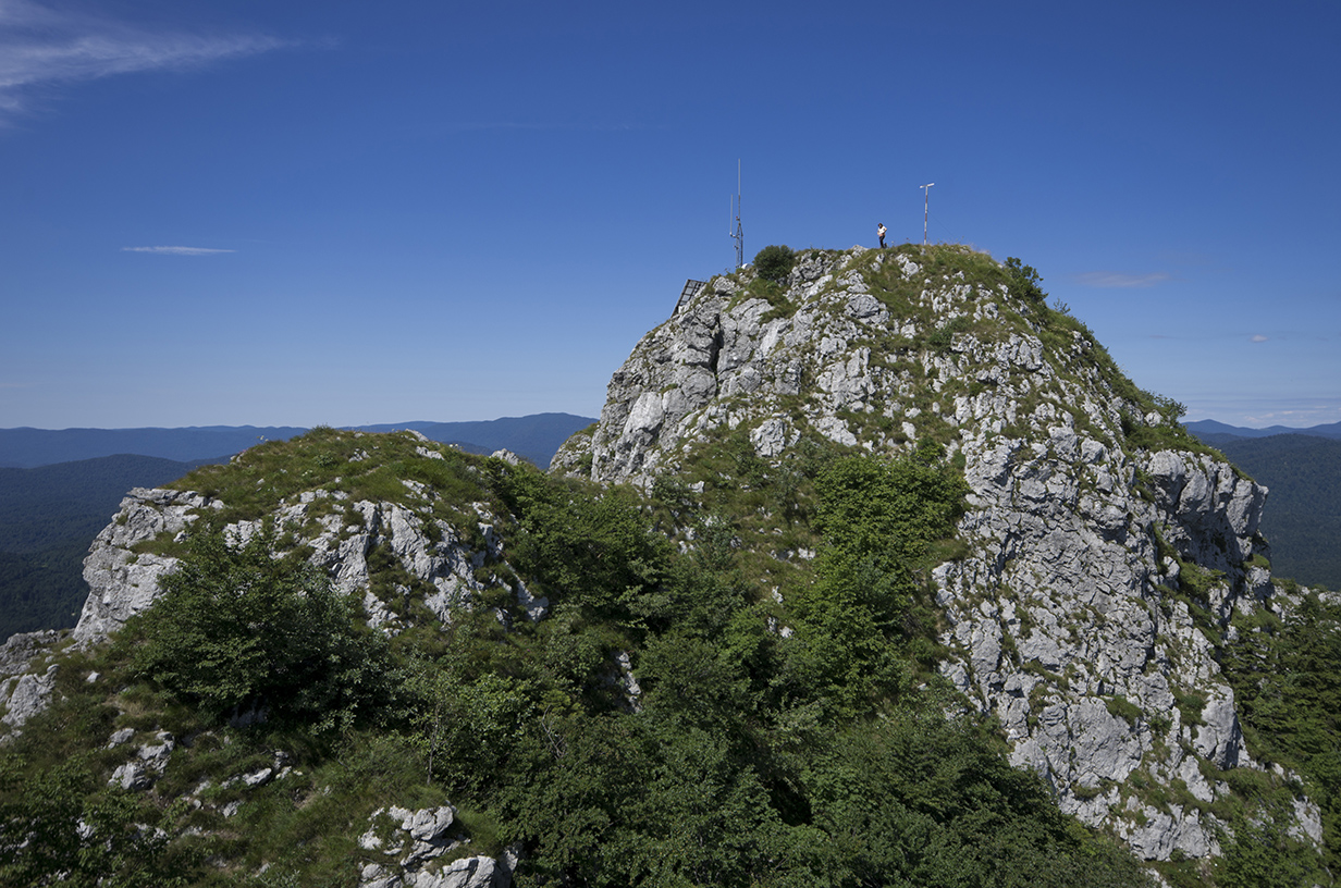 Pogled na vrh Kleka